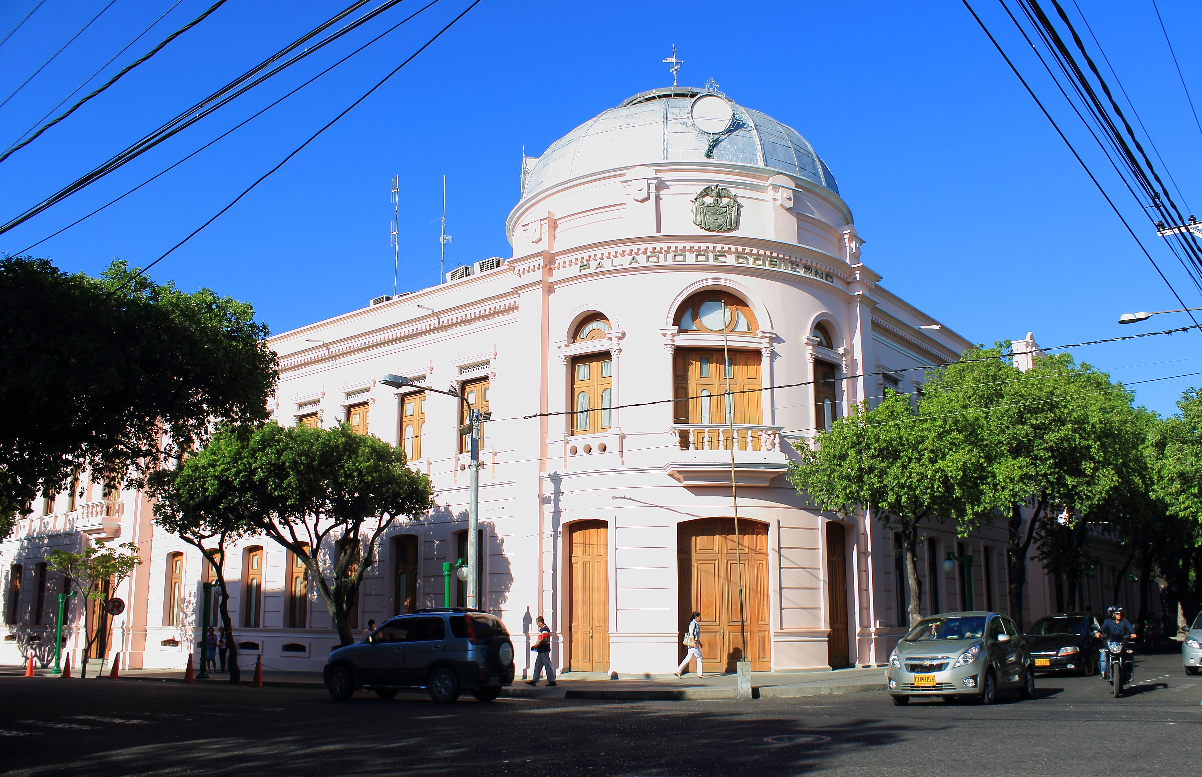 Conocido como el “Palacio de la Cúpula Chata” ubicado entre la avenida 5ta entre calles 13-14